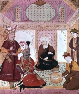 Əmir Teymurun Ərdəbildə Xoca Əli Səfəvini ziyarət etməsi